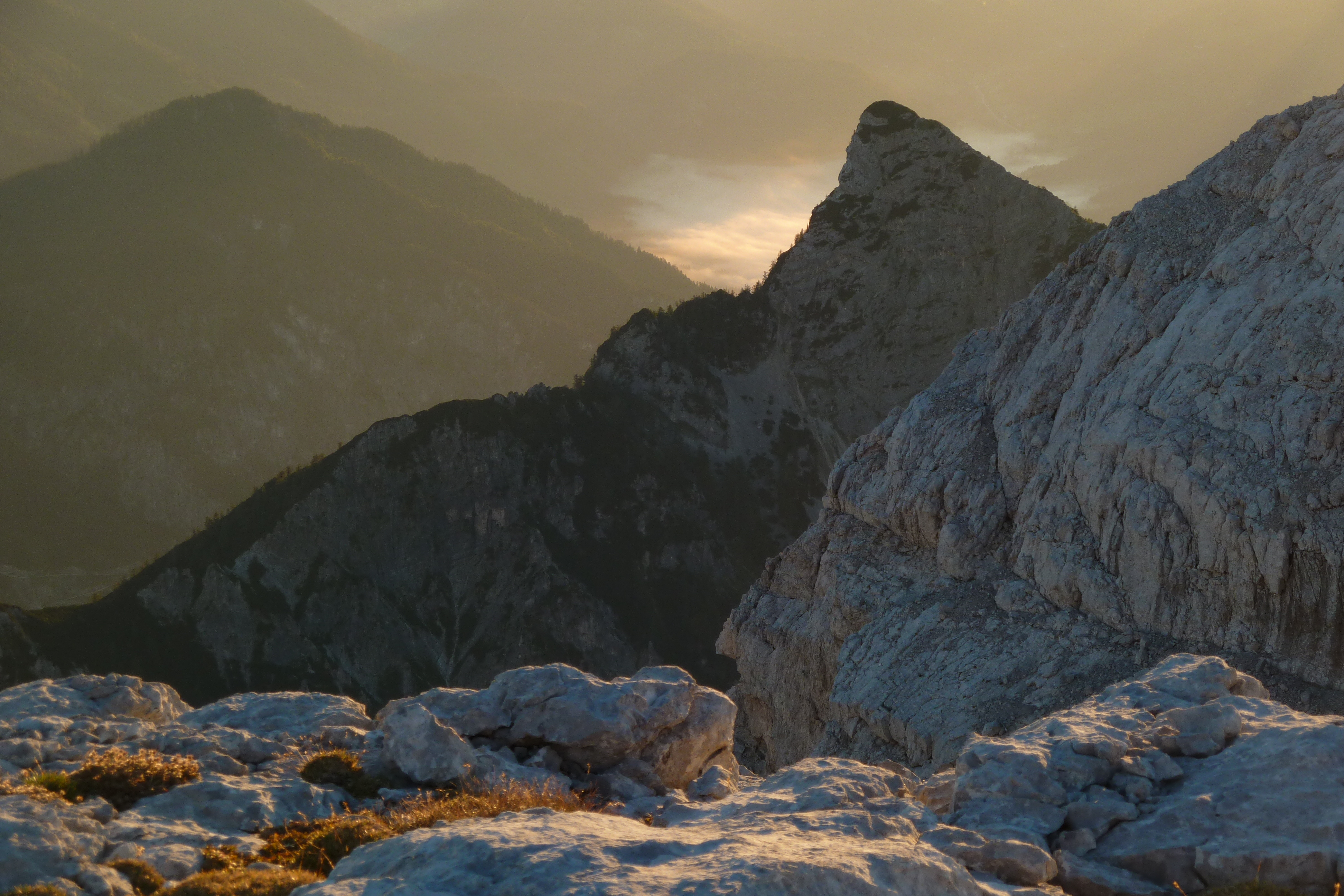 Totes Gebirge West This media shows the nature reserve in Styria with the ID NSG 16 a.